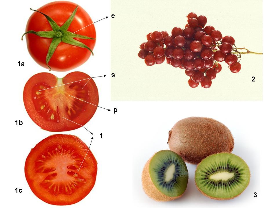 Tres ejemplos de fruto baya: tomate (1), uva (2) y kiwi (3). En el caso del tomate puede observarse el cáliz persistente en la vista superficial del fruto (1a), los tabiques (t) que separan los lóculos del ovario y las placentas (p) que llevan las semillas (s) en el corte longitudinal (1b) y transversal (1c) del fruto.